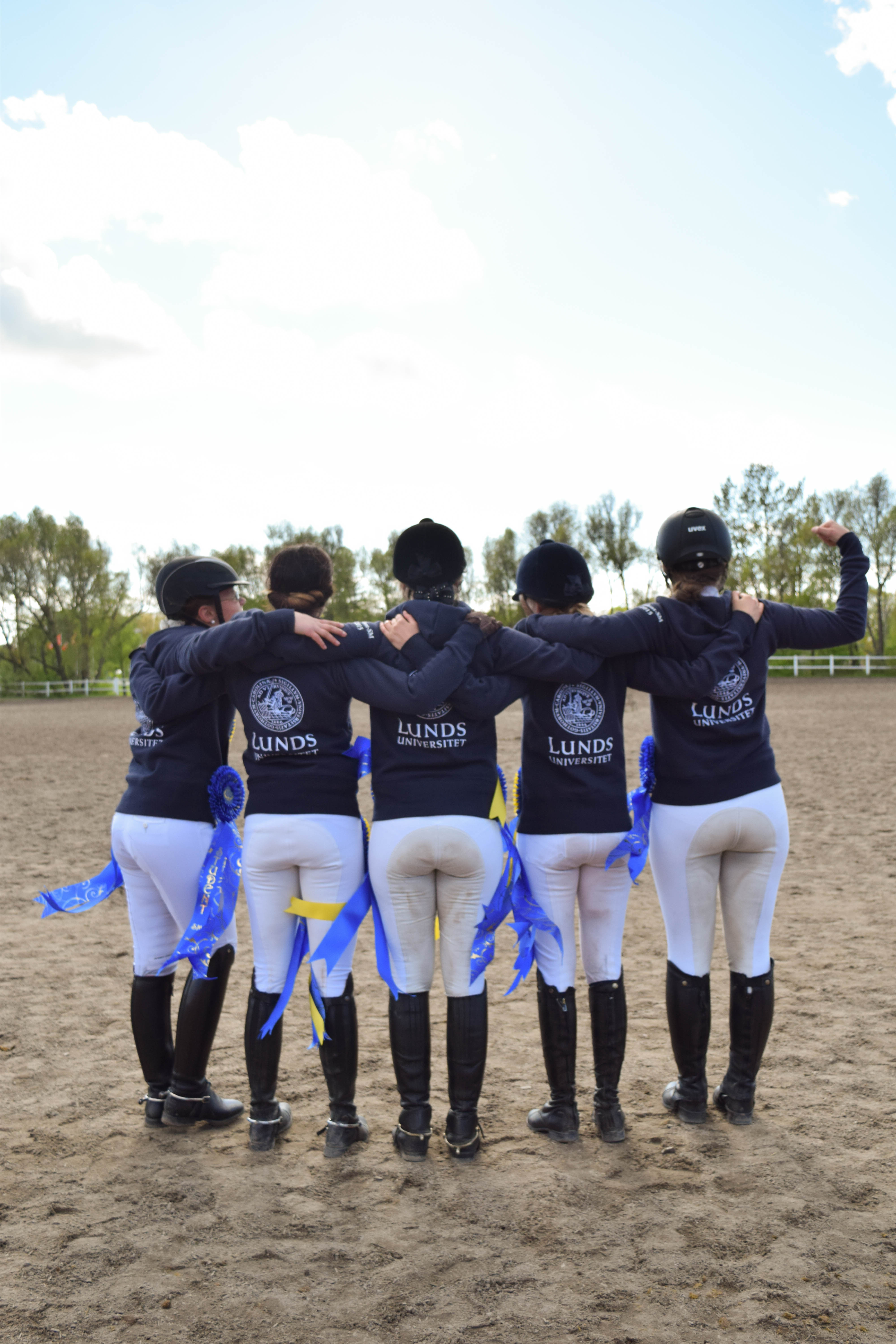 Lunds Akademiska Ryttarsällskap anordnade Student-SM i Ridsport 2015, de egna laget tog medalj efter medalj i både hoppning och dressyr.